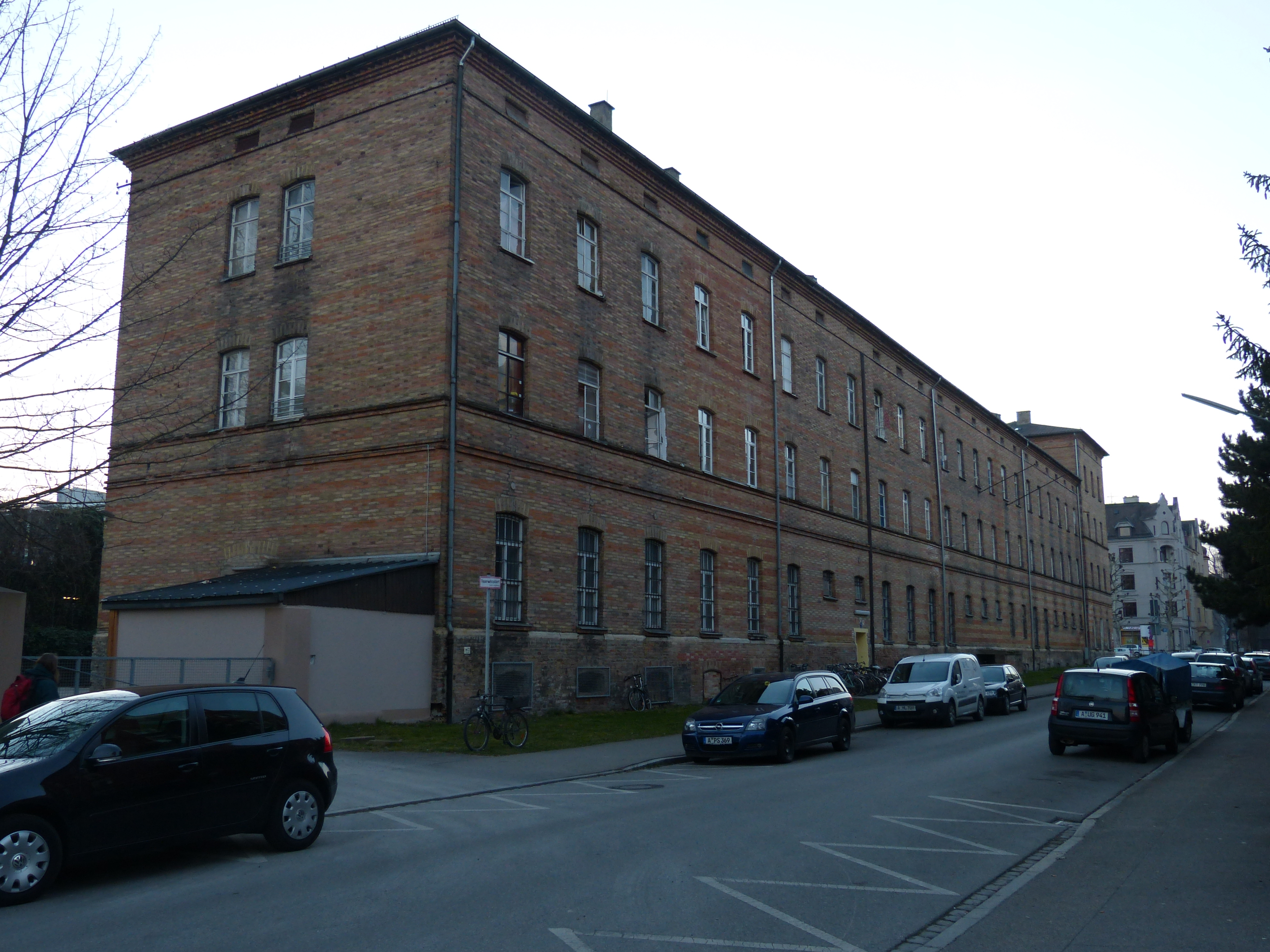 Augsburg, Calmbergstraße 2a. Nordflügel der ehem. Artilleriekaserne, sog. Hindenburgkaserne. This is a photograph of an architectural monument.